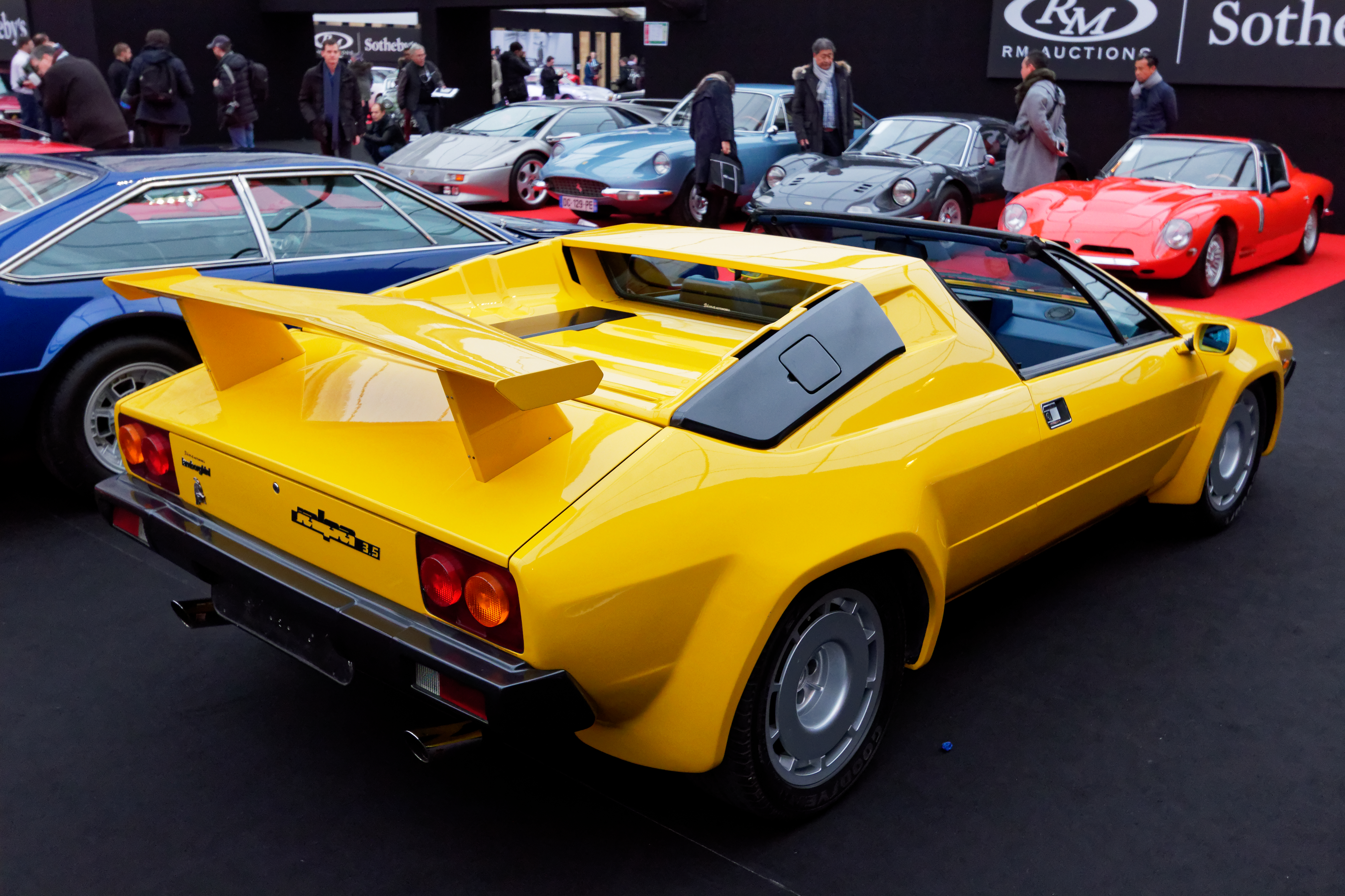 Un véhicule exposé lors de la vente RM Sotheby’s 2018 aux Invalides à Paris.